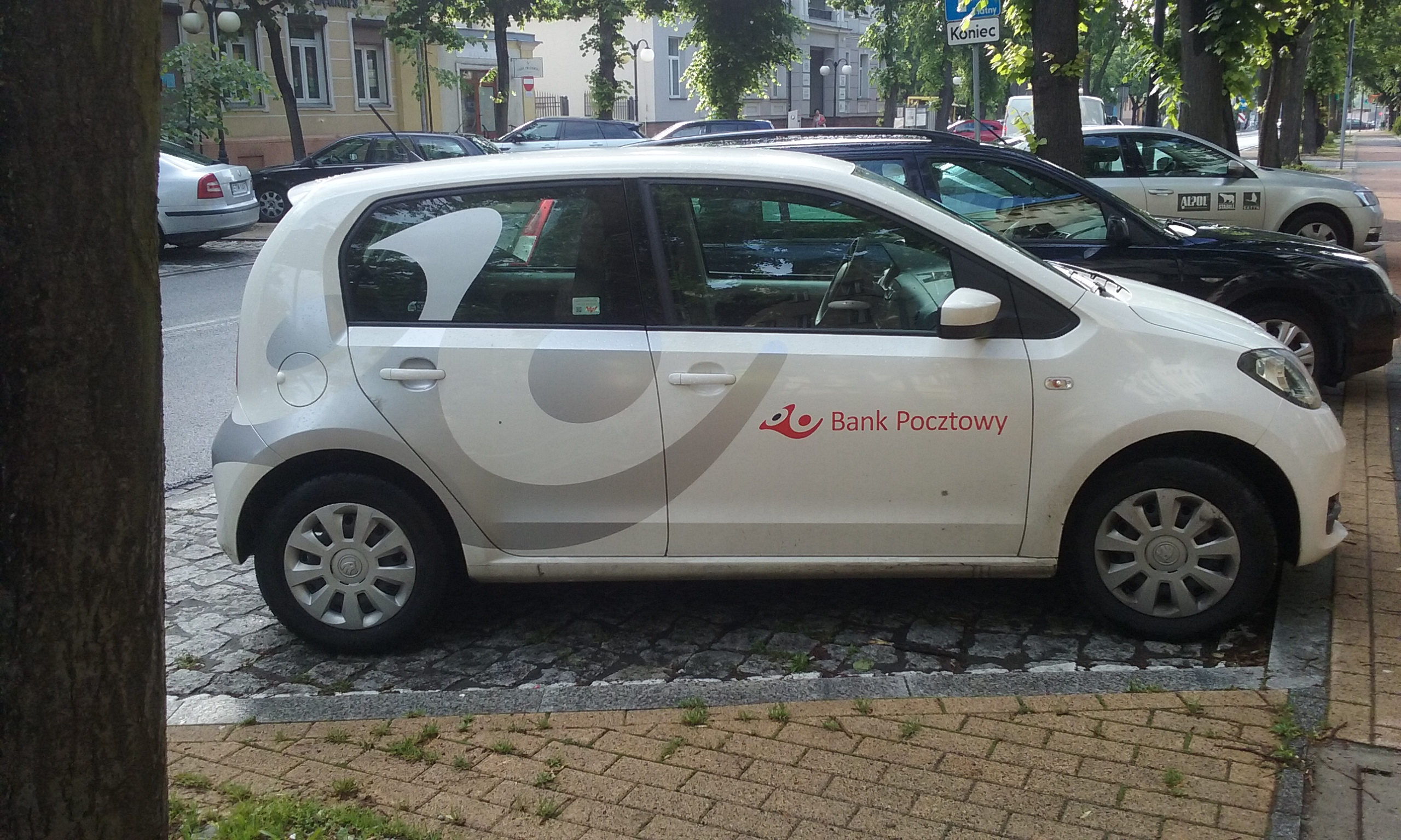 Tomaszów Mazowiecki w województwie łódzkim, PL, EU. Samochód agenta Banku Pocztowego. CC0